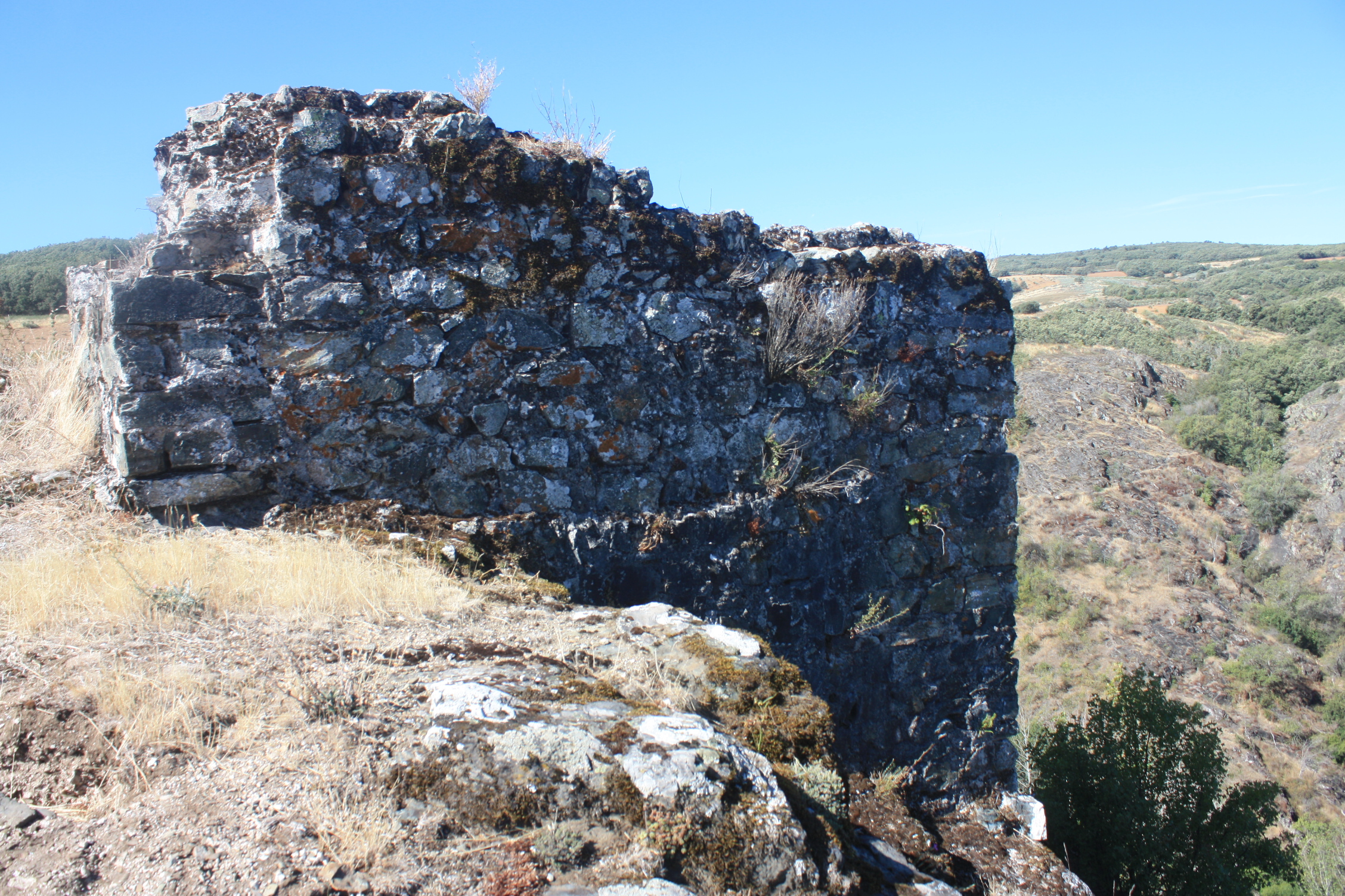 Castelo de Rebordãos - castelo medieval em Rebordãos, Portugal Cultural property Castle of Rebordãos, Rebordãos, Bragança, Bragança District, Portugal Q5049820, SIPA ID: 1057, DGPC ID: 73806 Wiki Loves Monuments ID: DGPC-73806